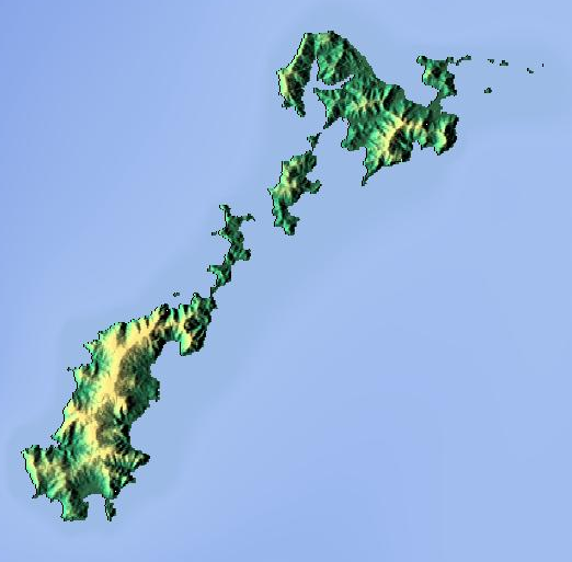 鹿児島県甑島列島地形図